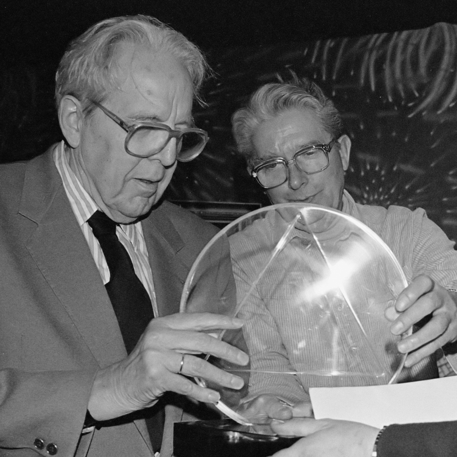 Charles Boost ontvangt Cinemagiceprijs voor bijdrage aan inzicht in belang kwaliteitsfilm 22 januari 1988